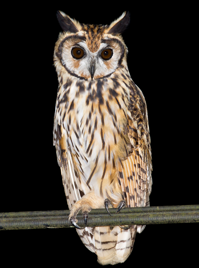 Bijagua, Costa Rica